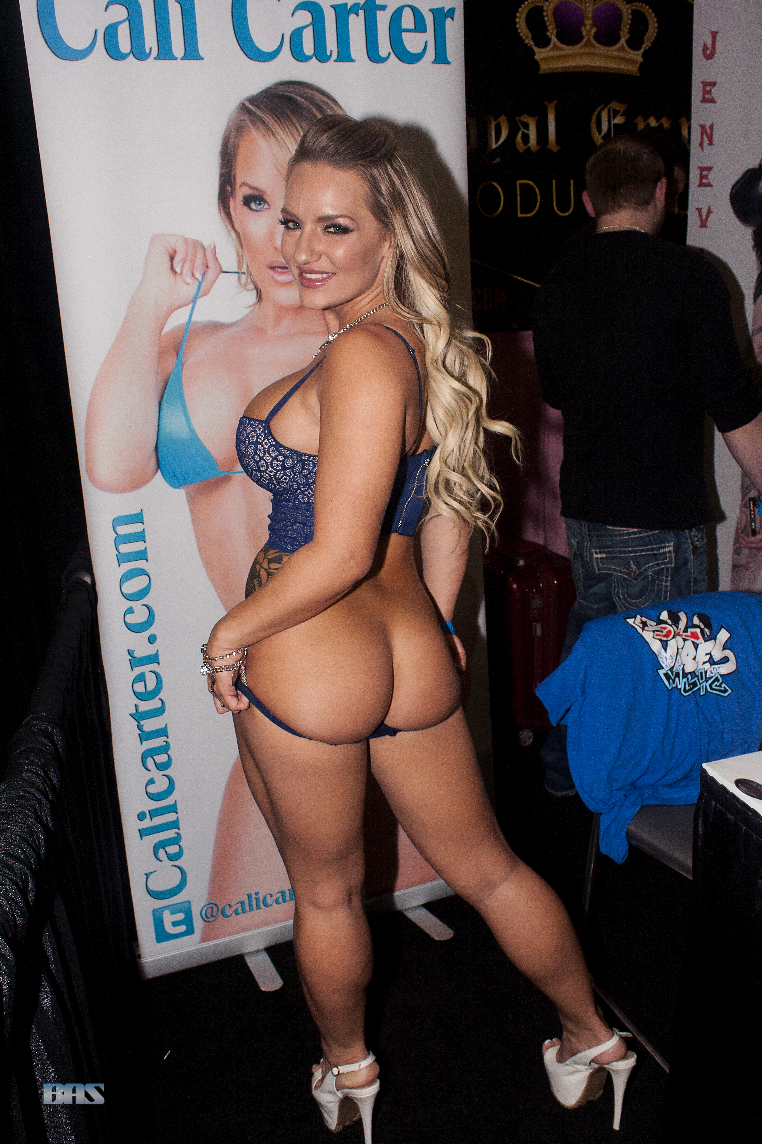 Exxxotica2016_0088bas